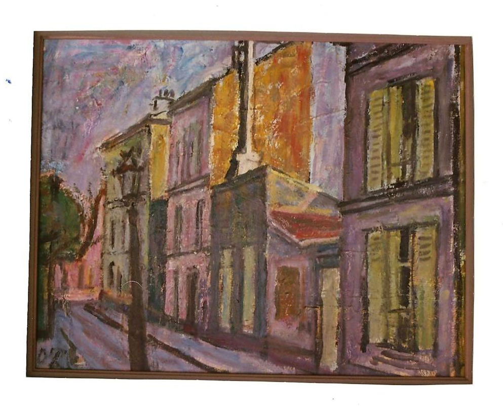 Strasse in Paris.title QS:P1476,de:"Strasse in Paris." label QS:Lde,"Strasse in Paris."